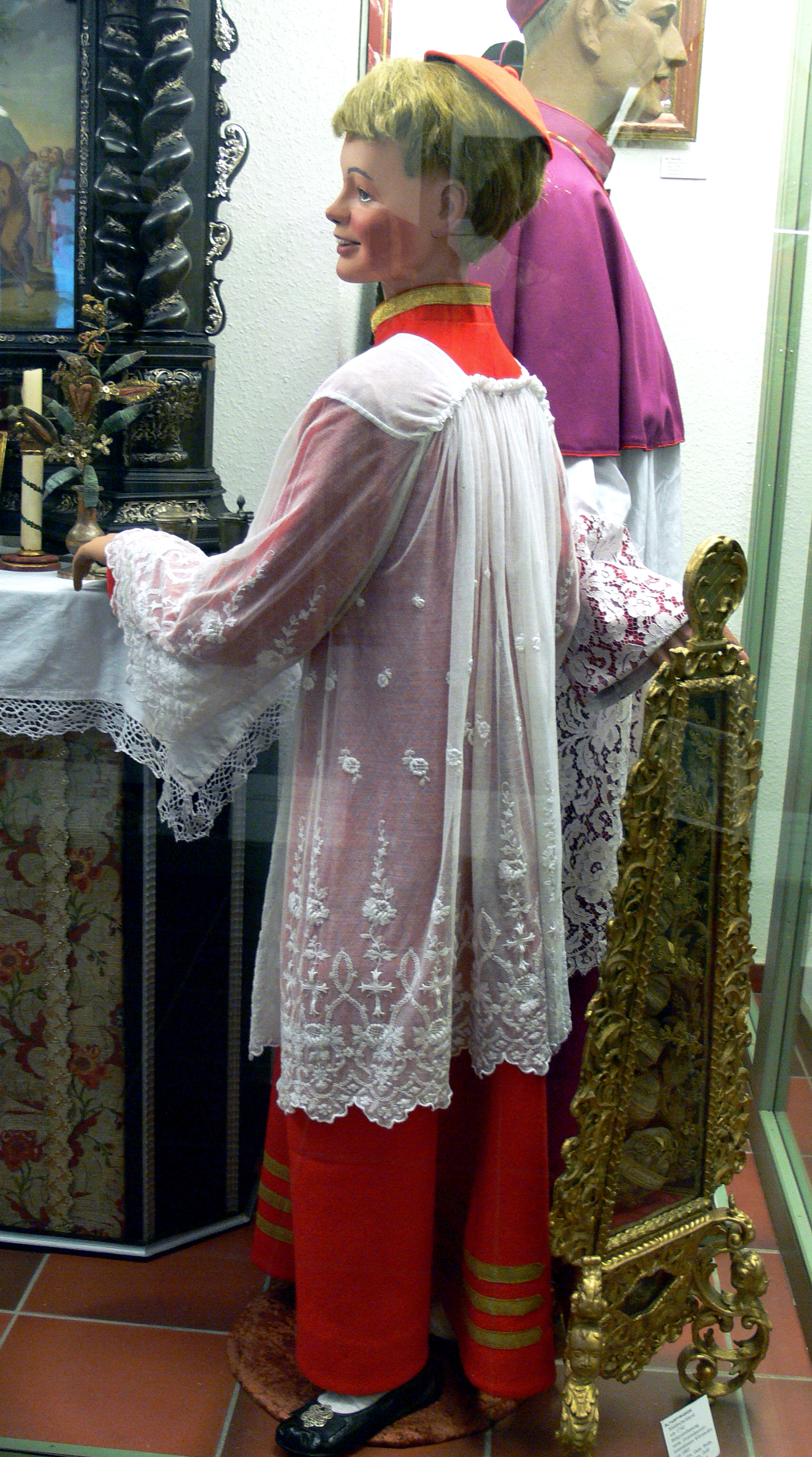 Weingarten, Museum für Klosterkultur, Figurine eines Ministranten